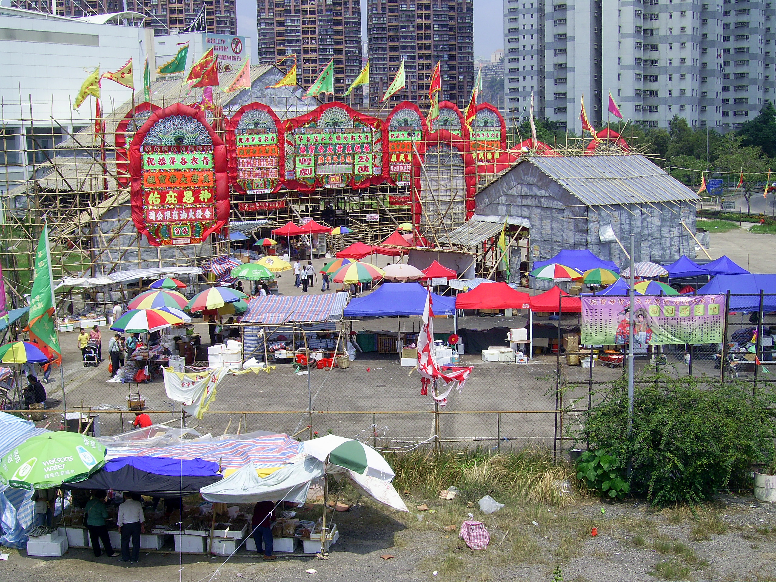 中文（香港）: 真君誕場地